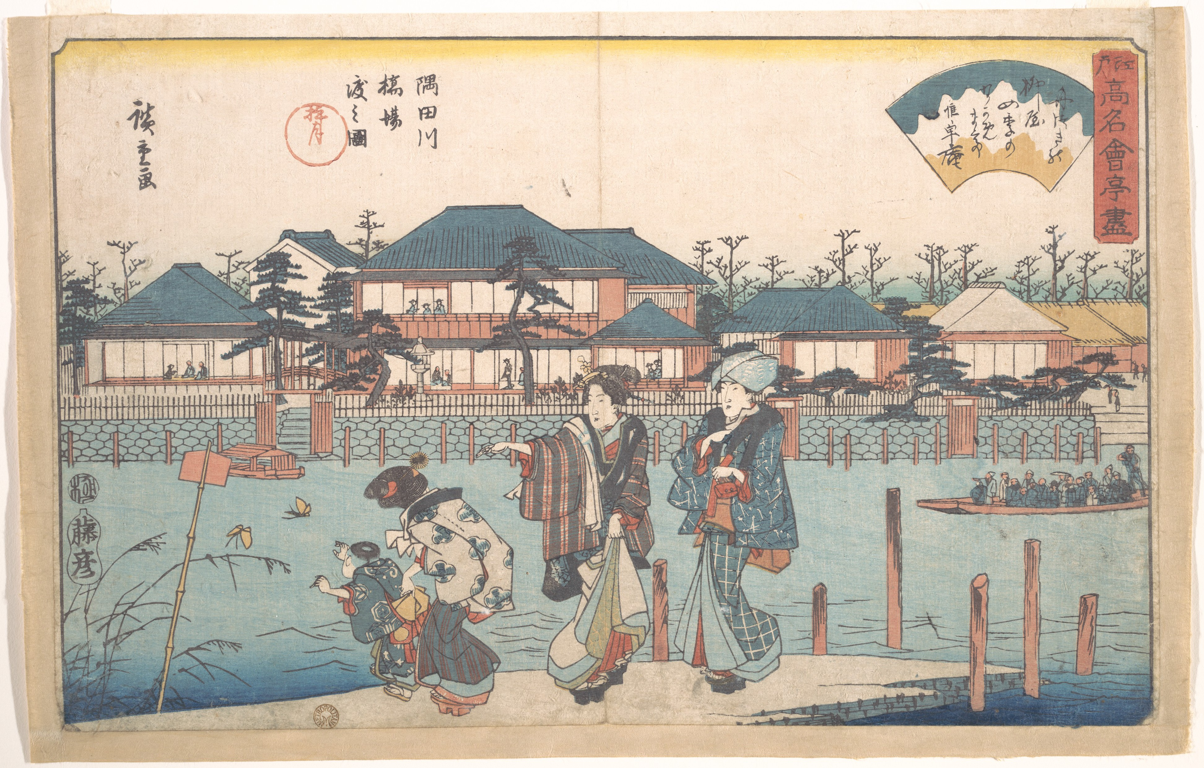 Japan; Print; Prints